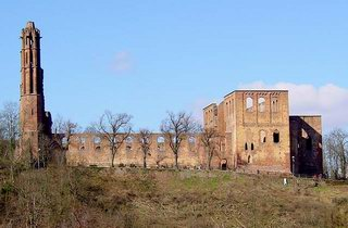 Die Klosterruine Limburg bei Bad Dürkheim Fotograf: Karl Rösel